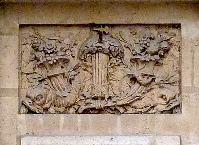 Fontaine de Jarente (1783), impasse de la Poissonnerie, Paris (4e arrondissement) - Détail : le bas-relief central